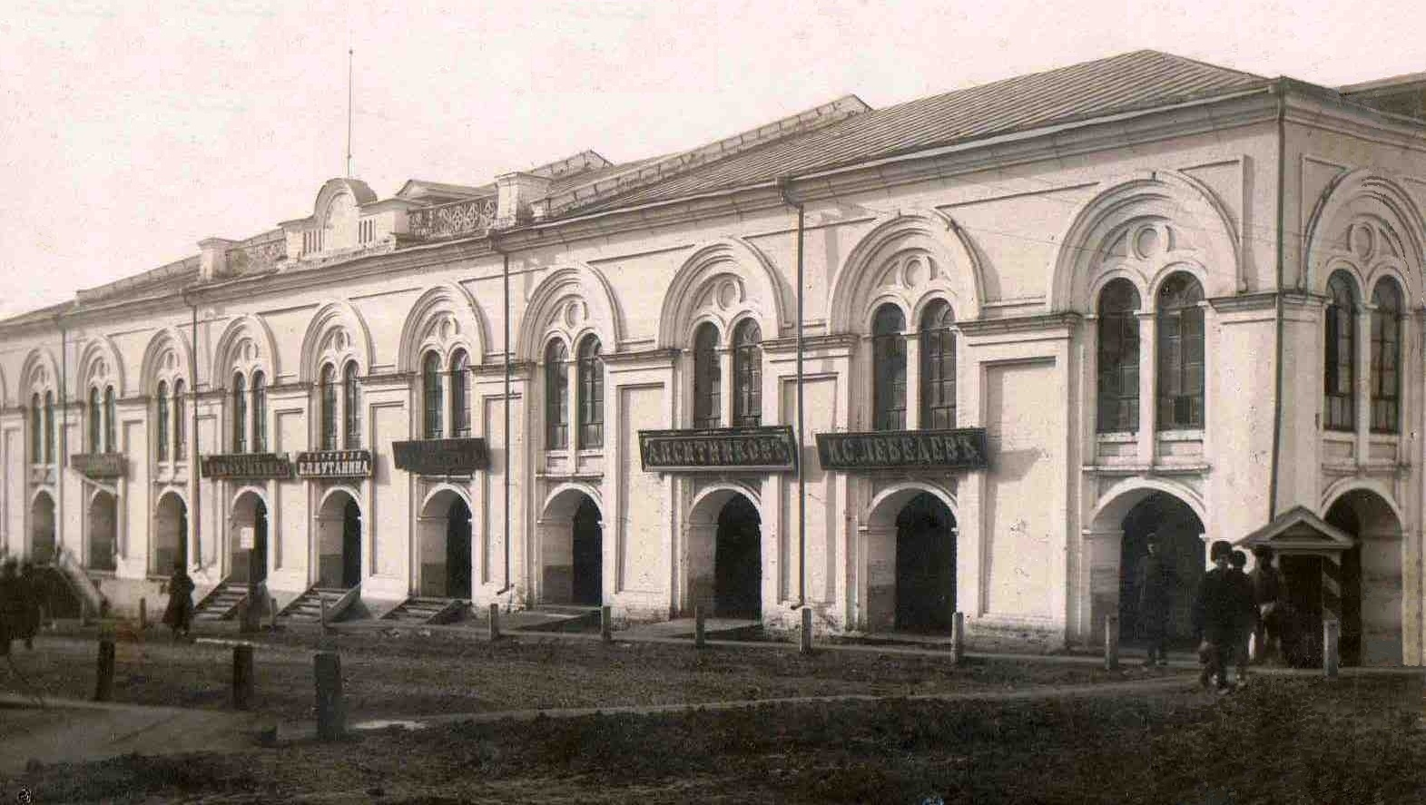 Торговые ряды купцов Носовых, Яранск, Россия